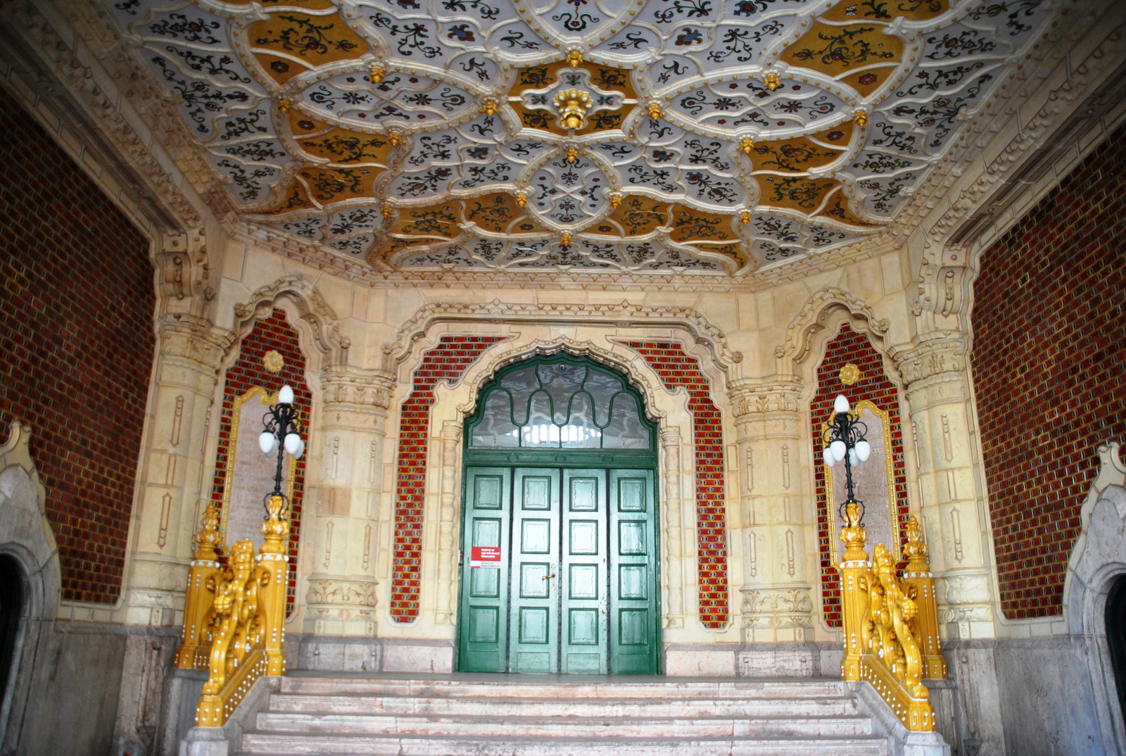 A Budapesti Iparművészeti Múzeum nyitott előcsarnoka. (Budapest 9, Üllői út 33-37., Hőgyes Endre utca 10-12., Kinizsi Pál utca 31.) This is a photo of a monument in Hungary. Identifier: 1070